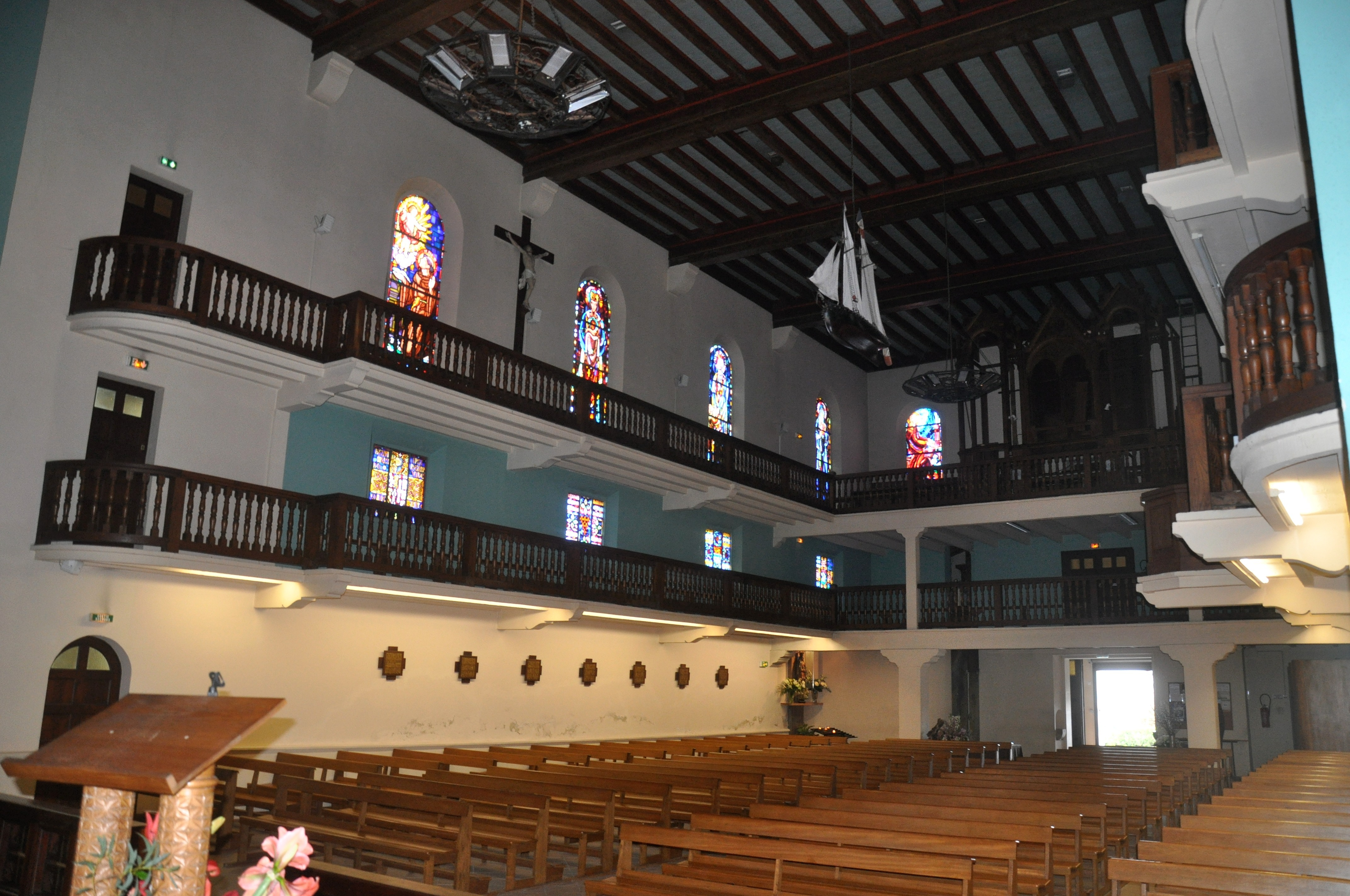 Eglise Sainte Marie - Anglet